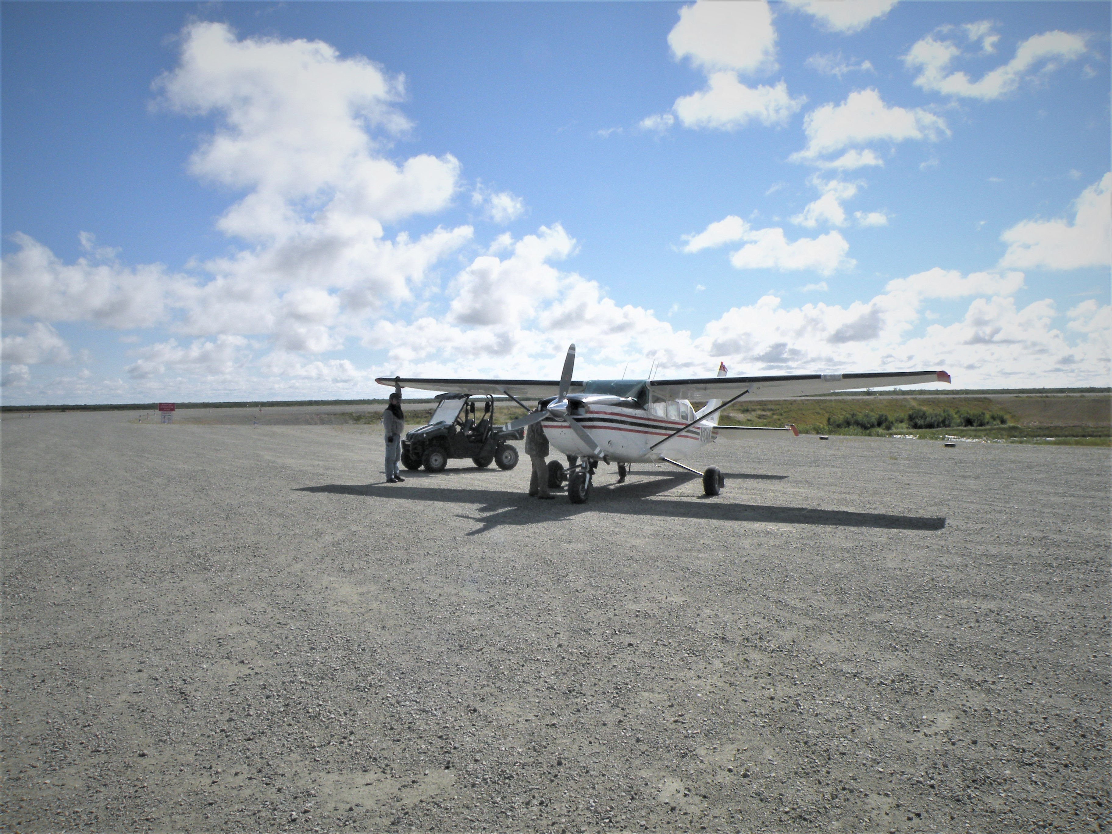 Airport Tuntutuliak